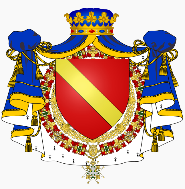 armes noailles